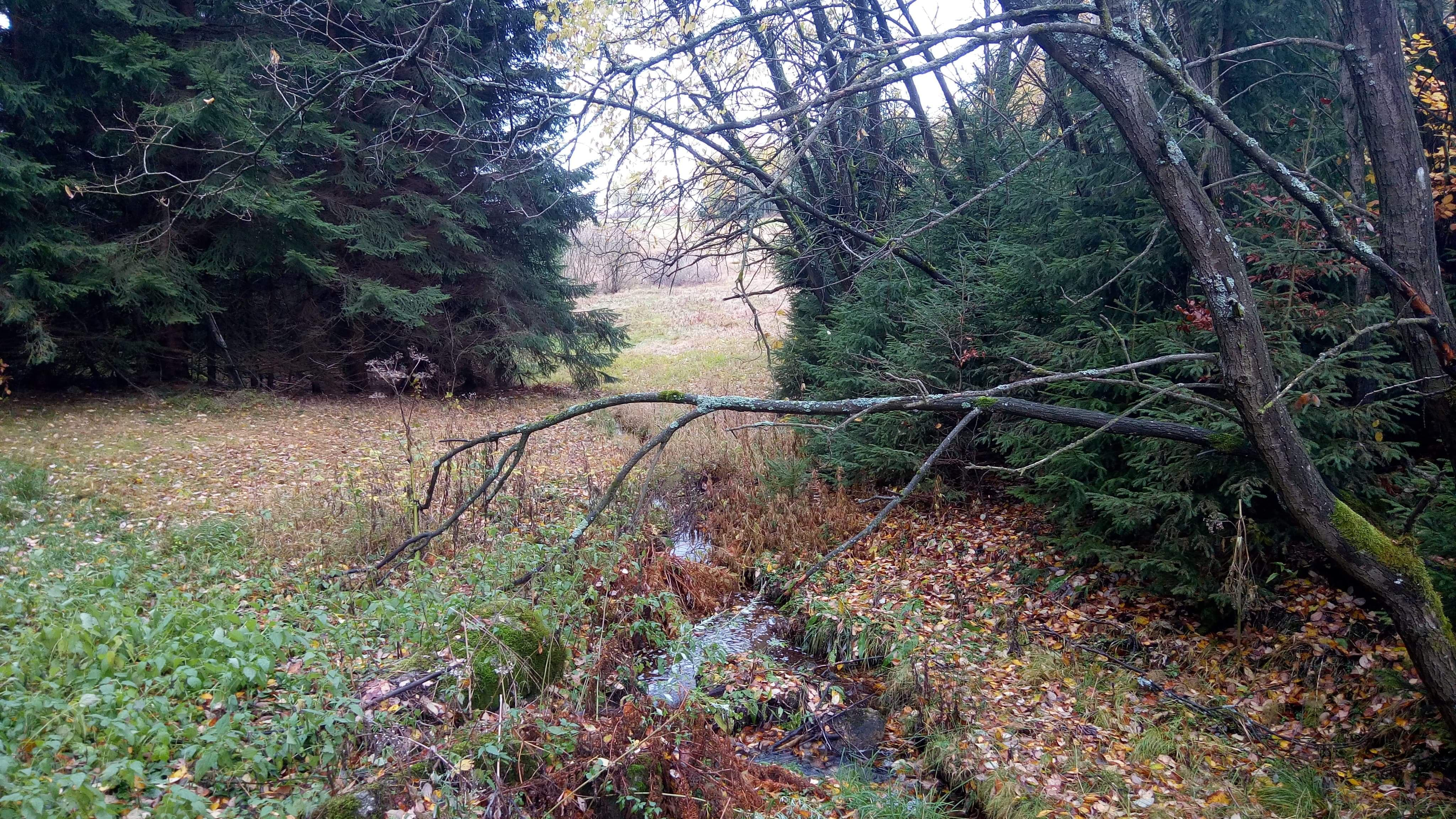 pohled na potok Tichá říčka